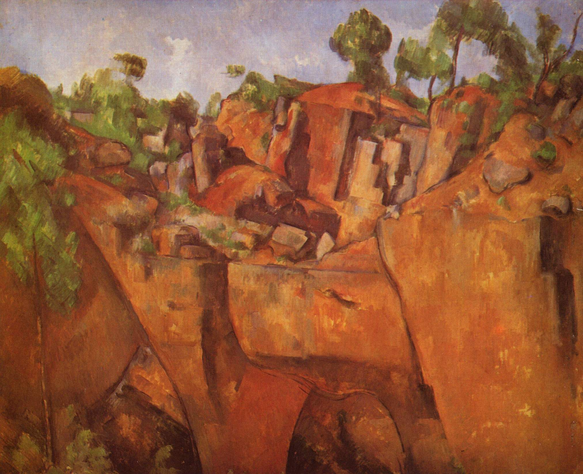 Steinbruch Bibemus